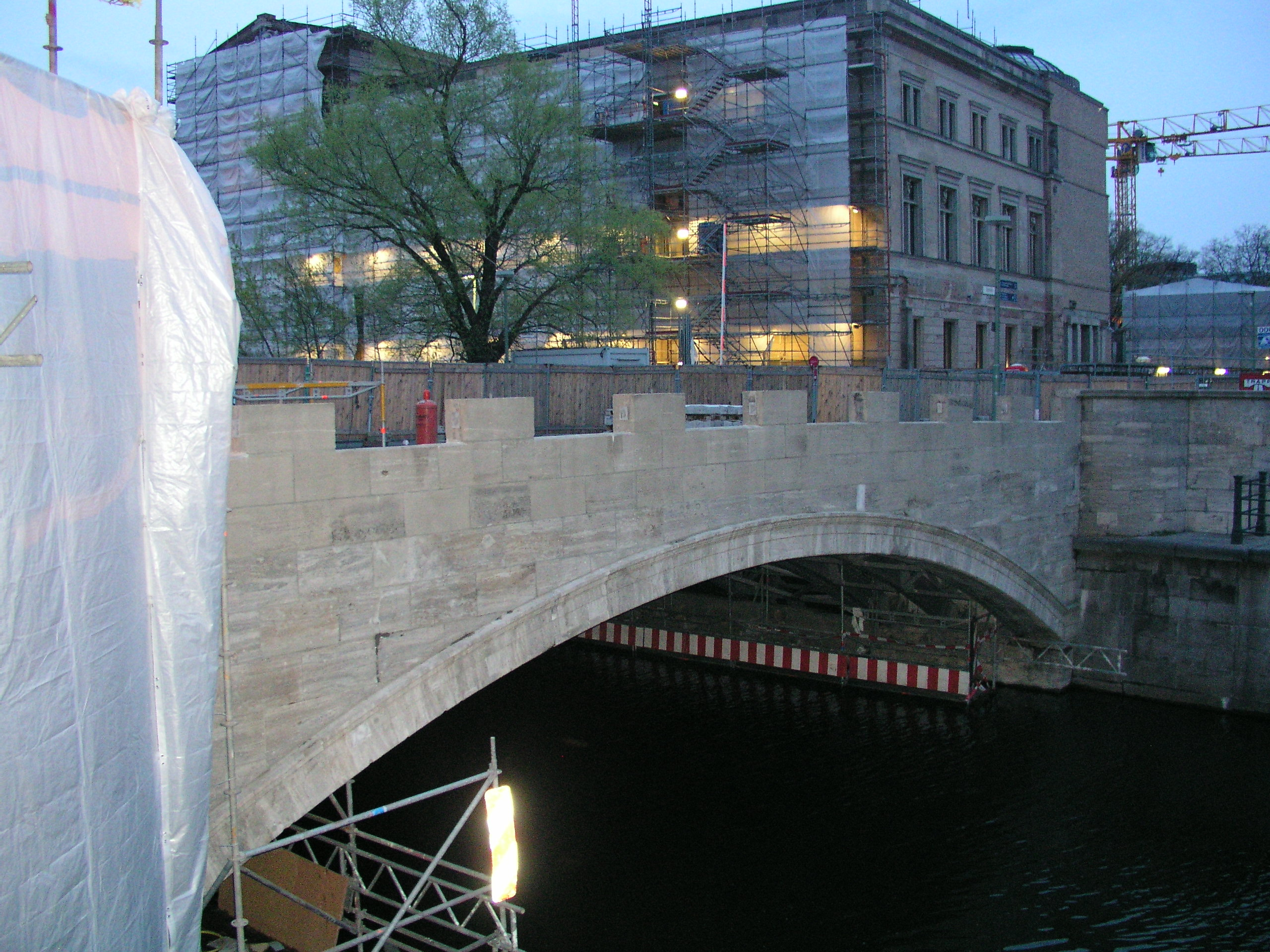 Eiserne Brücke in Berlin-Mitte in Reko, die Bronzefelder in der Brüstung fehlen noch